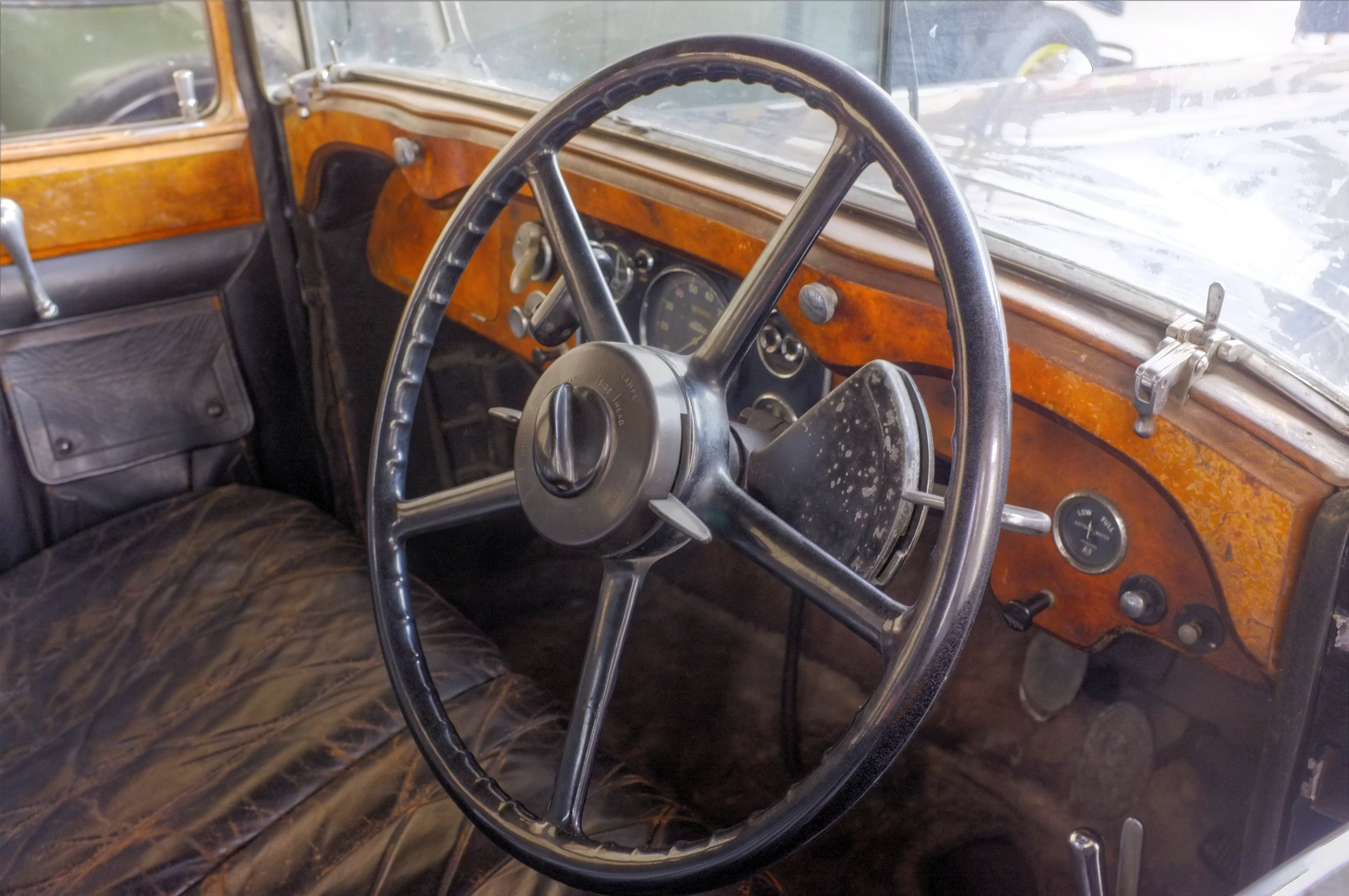 1934 Daimler Twenty-Five Straight-Eight V26 limousine by Hooper at Schlafende Schönheiten Kassel